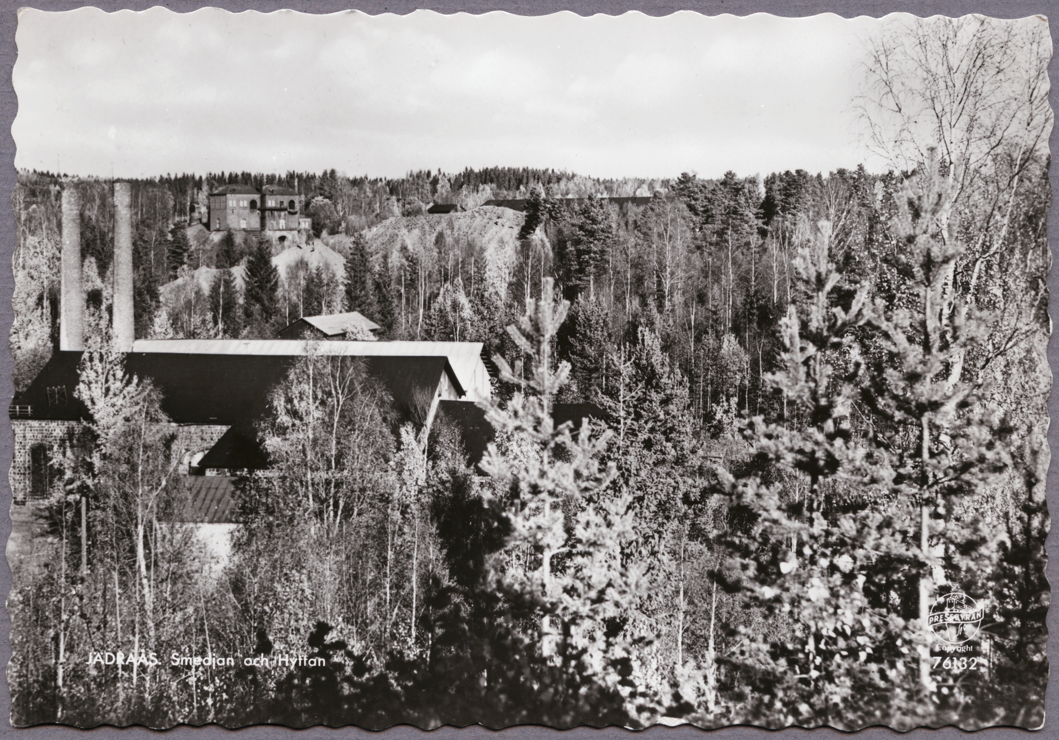 Jädraås, hyttan och smedjan, Ockelbo kommun, Gästrikland. Vykort. Pressbyrån, cirka 1960.